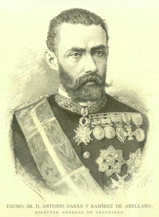 Excmo. Sr. D. Antonio Dabán y Ramírez de Arellano, Director General de Seguridad